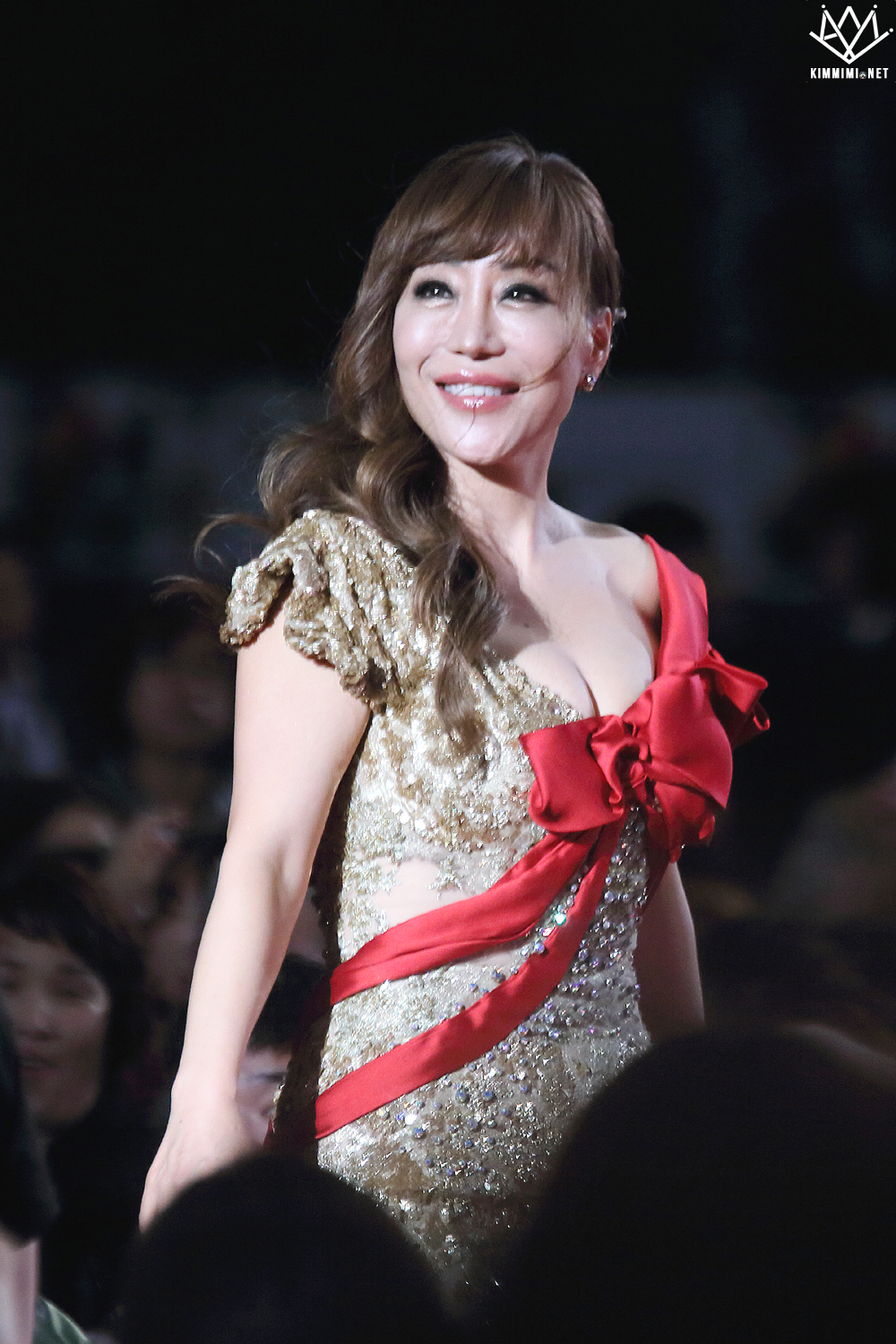 151001 부산국제영화제 개막식 레드카펫